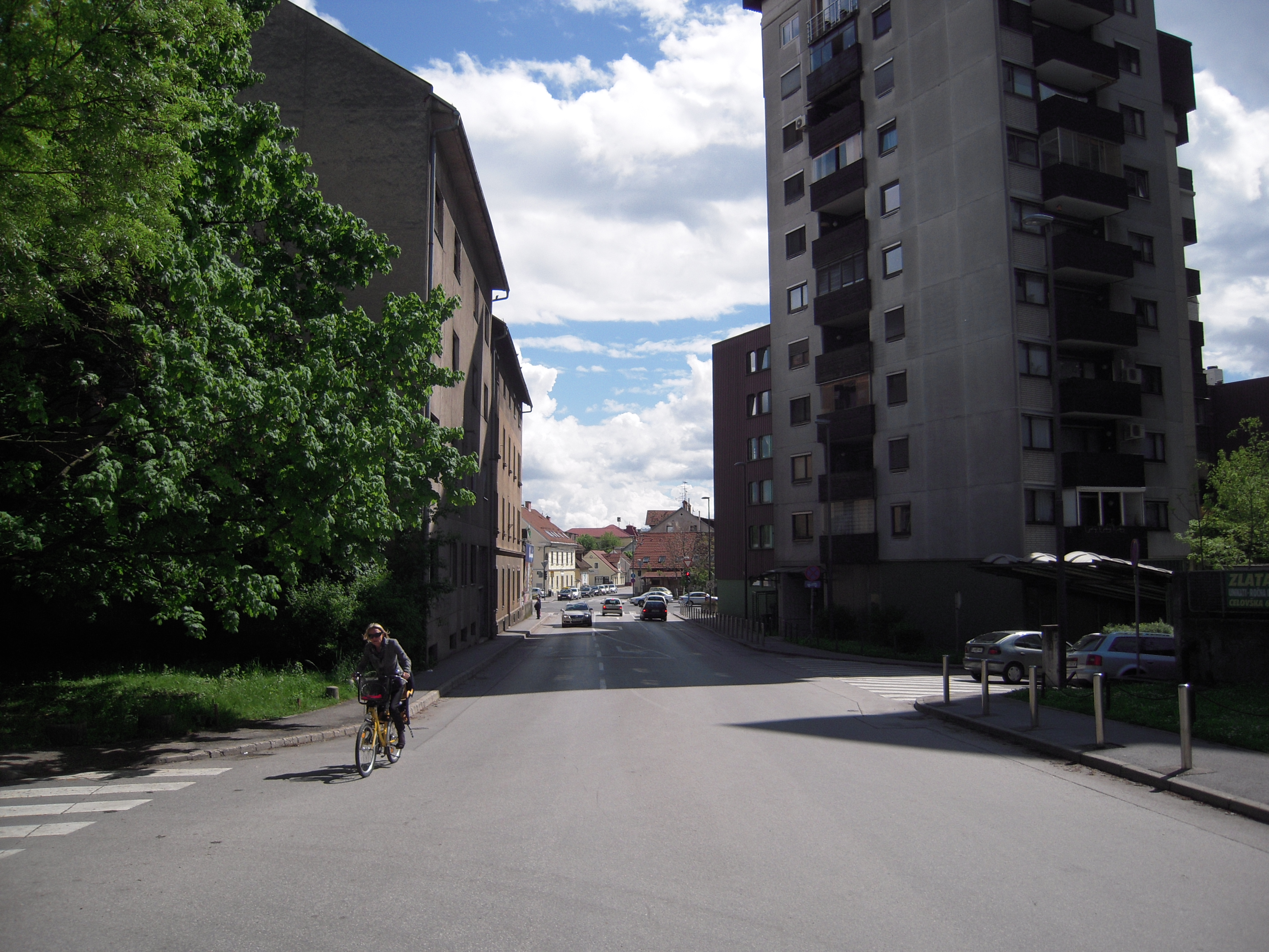 Tržna ulica